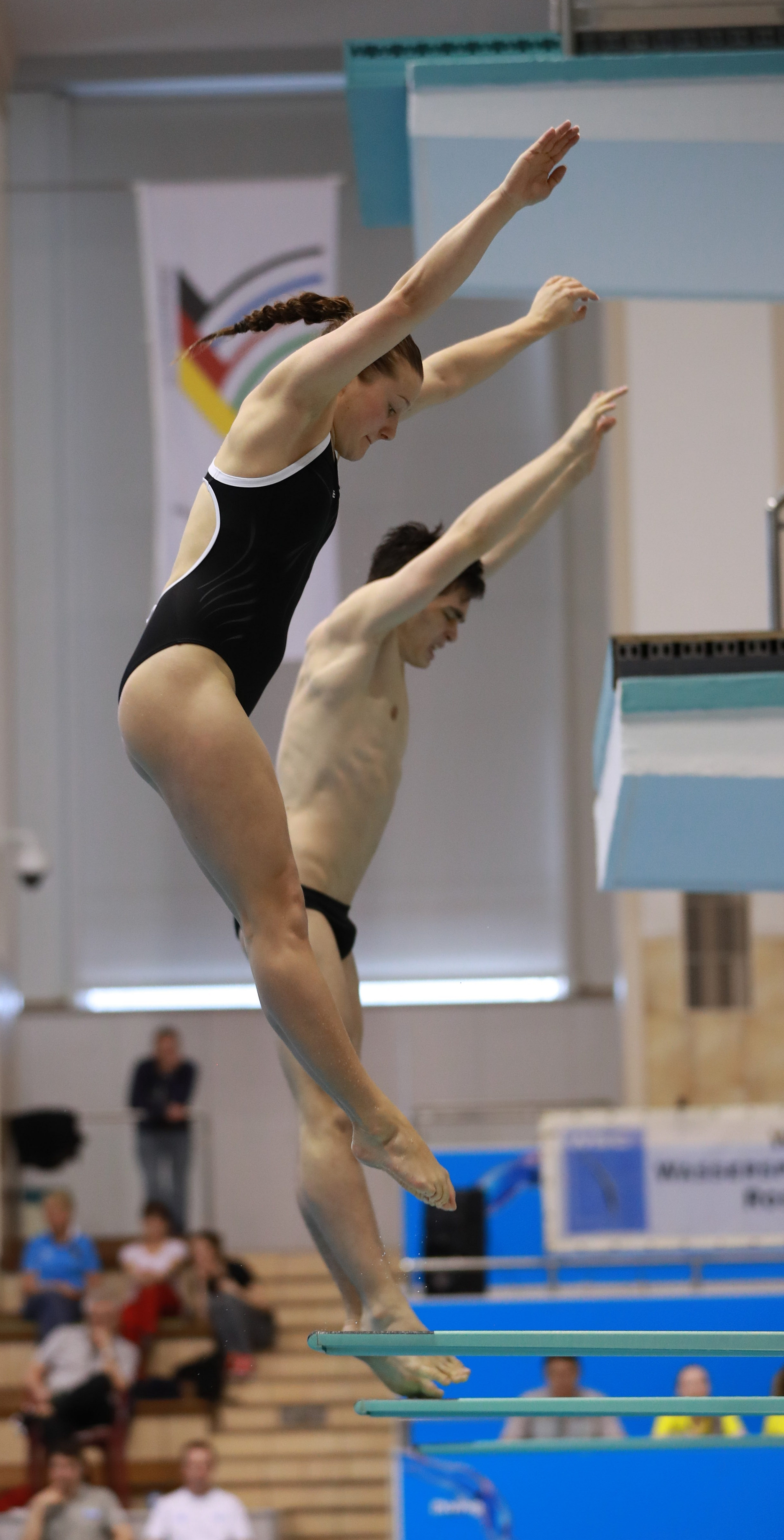 3m mixed Synchron Finale Sprung 1 bei den Internationalen Deutschen Hallenmeisterschaften im Wasserspringen Offene Klassen und Junioren. Abgebildet: Tina Punzel. Lou Massenberg.